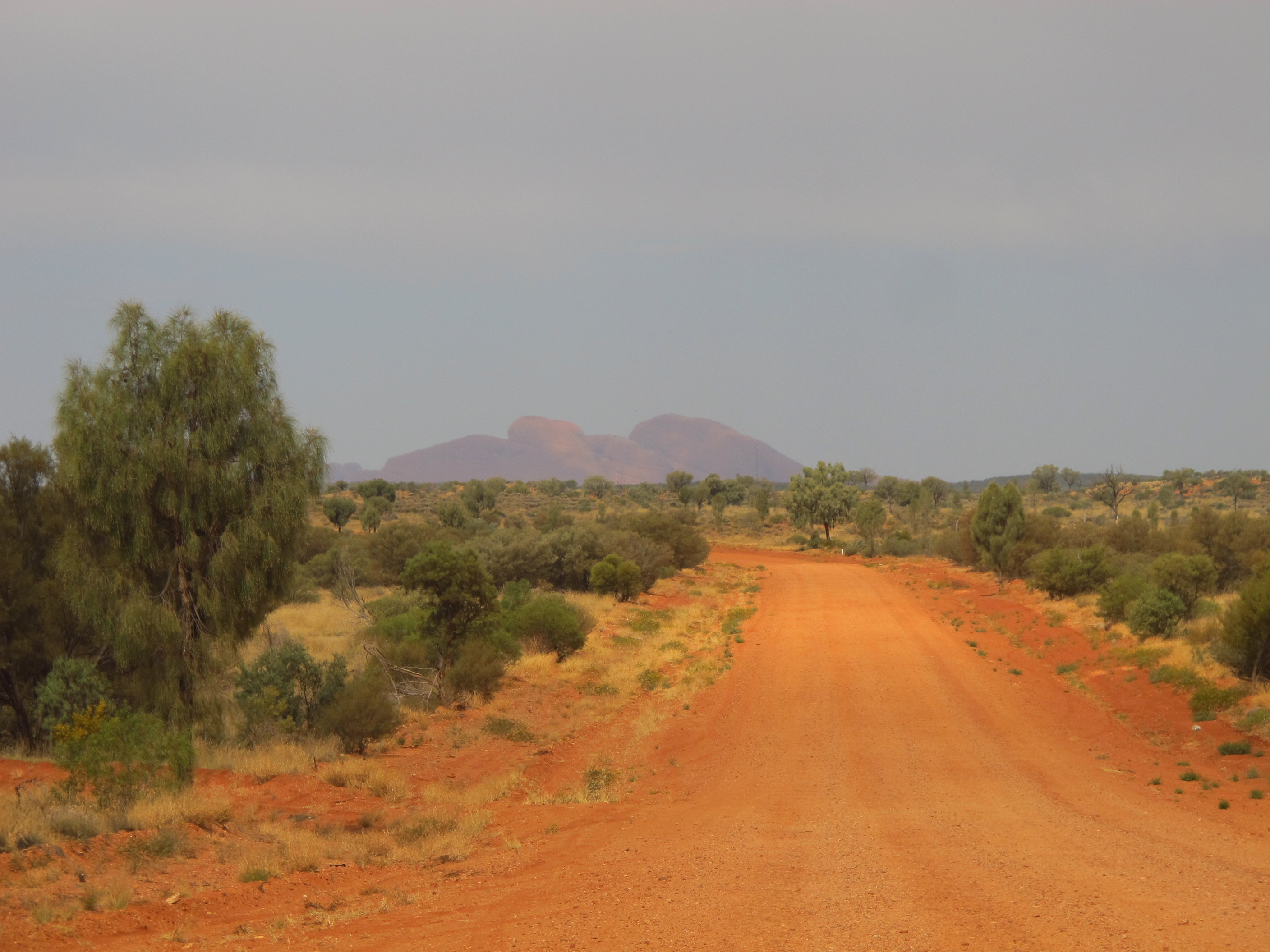 Tjukaruru Rd, östlich von Kaltukatjara (Docker River), rund 20km vor Kata Tjuta